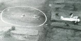 Relitti ancora allineati degli aerei dell'eccidio di Lechemti